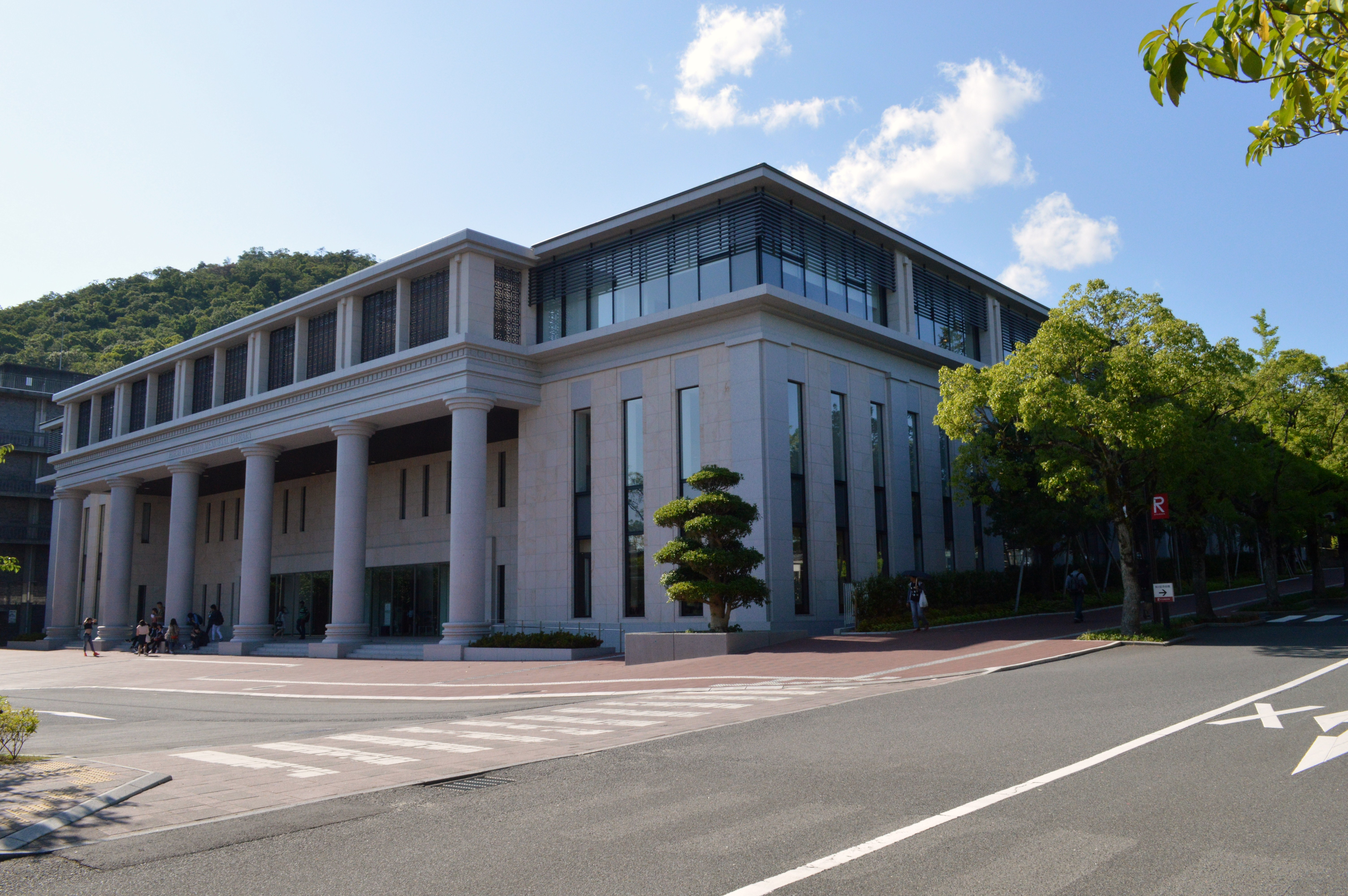 京都市北区の立命館大学衣笠キャンパスにある平井嘉一郎記念図書館。